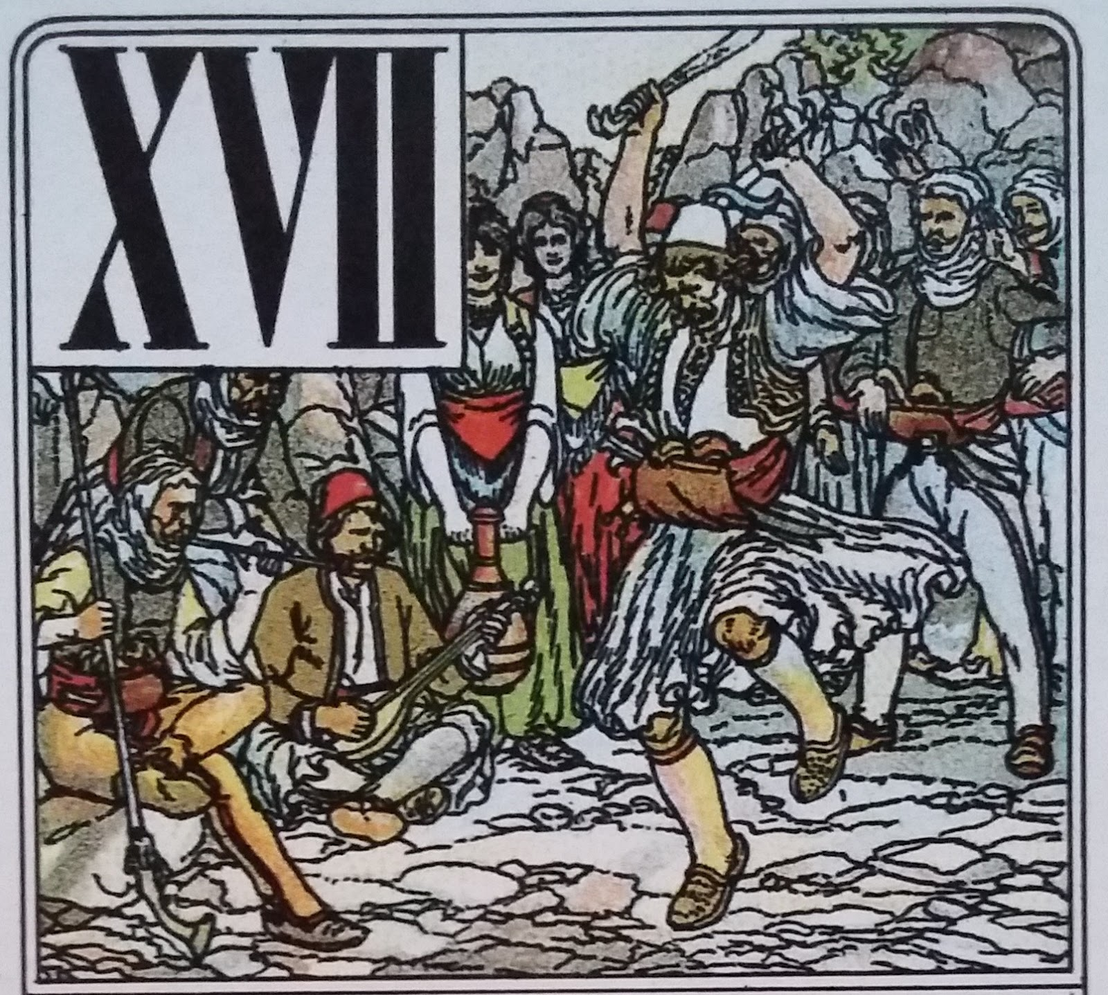 Smrekarjev tarok.